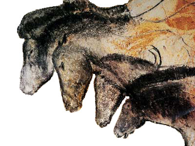 Chevaux de la grotte Chauvet (31 000 BP) Lieu de la découverte : Grotte Chauvet, Ardèche, France Date : 31 000 BP (Aurignacien)